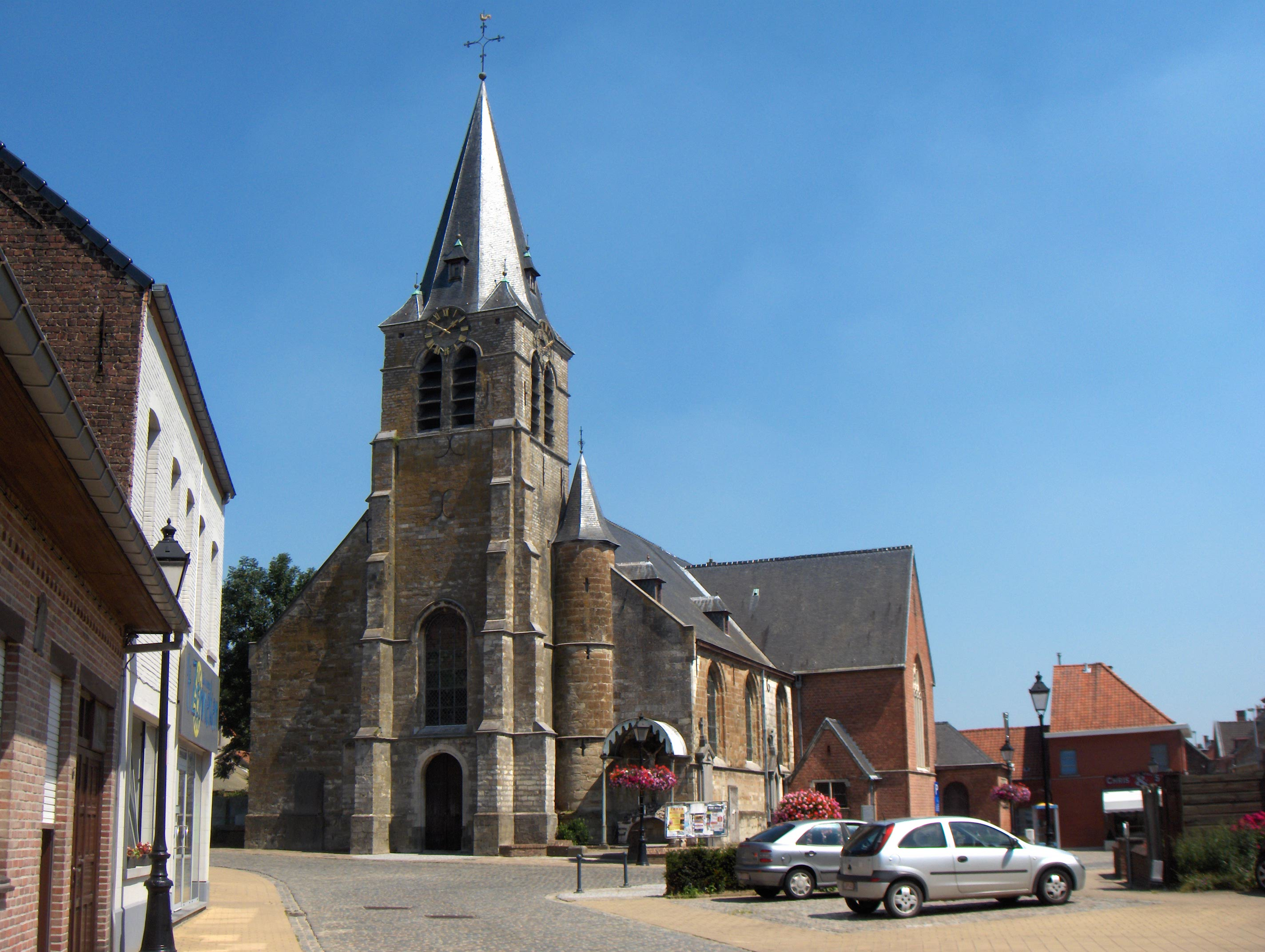 Denderleeuw (Belgien, Prov. Ostflandern), Ortsteil Iddergem, Amandikirche (15. Jh).